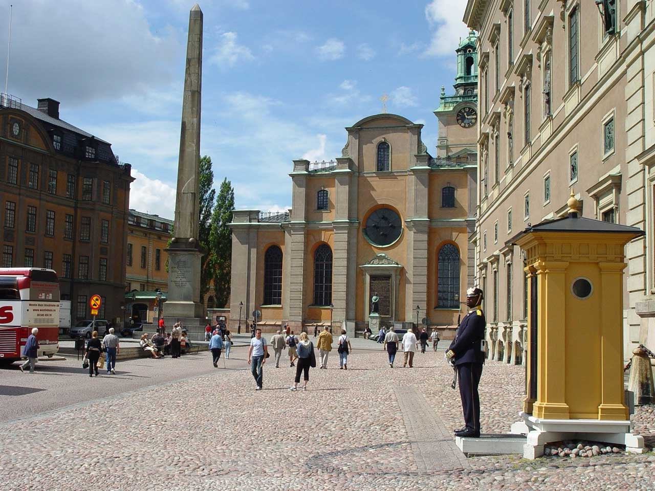 Storkyrkan in Stockholm, Gamla stan. Kirche und Schloss